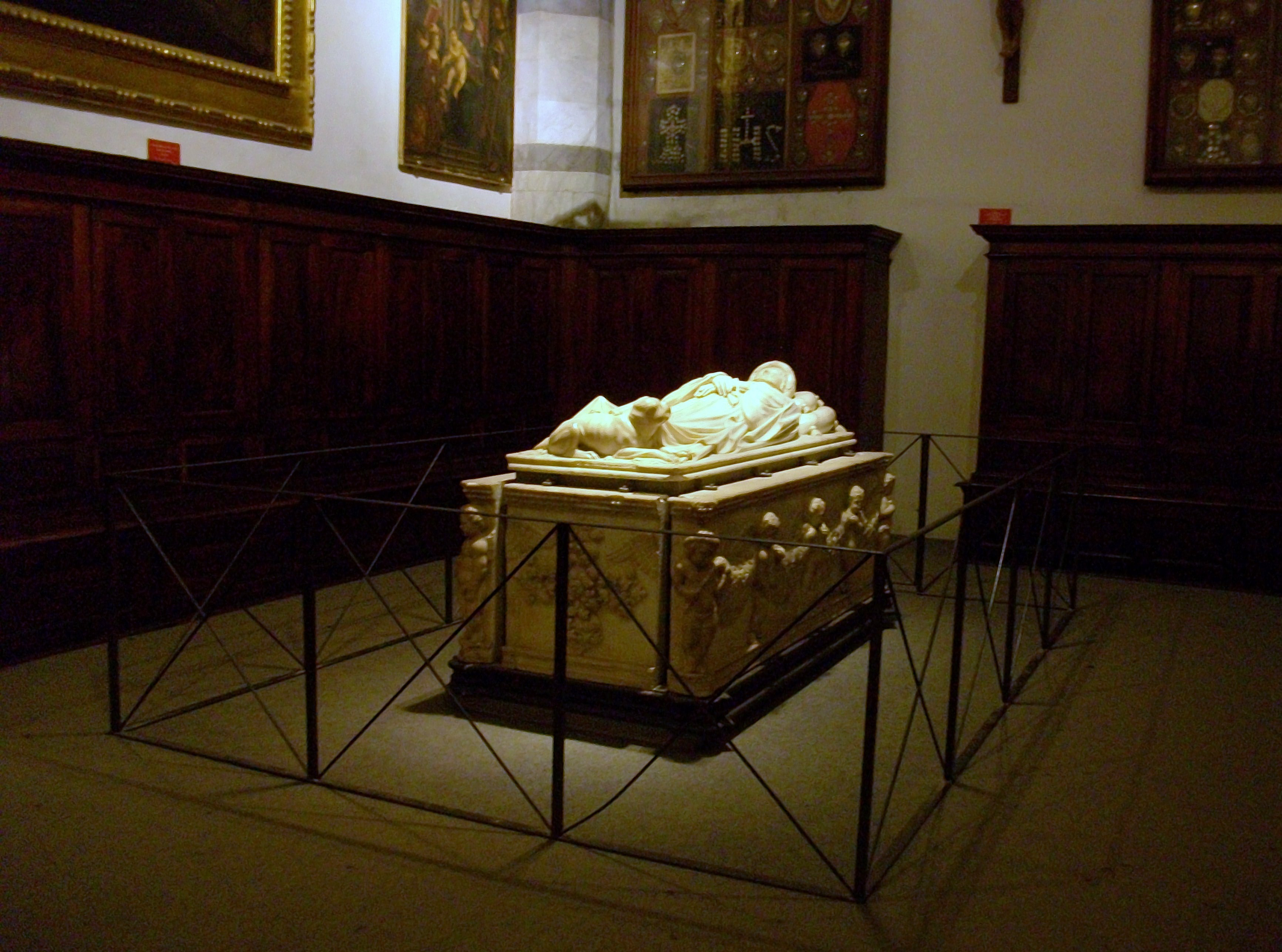 Monument funebre a Ilaria del Carretto, catedral de Lucca, obra de Jocopo della Quercia.